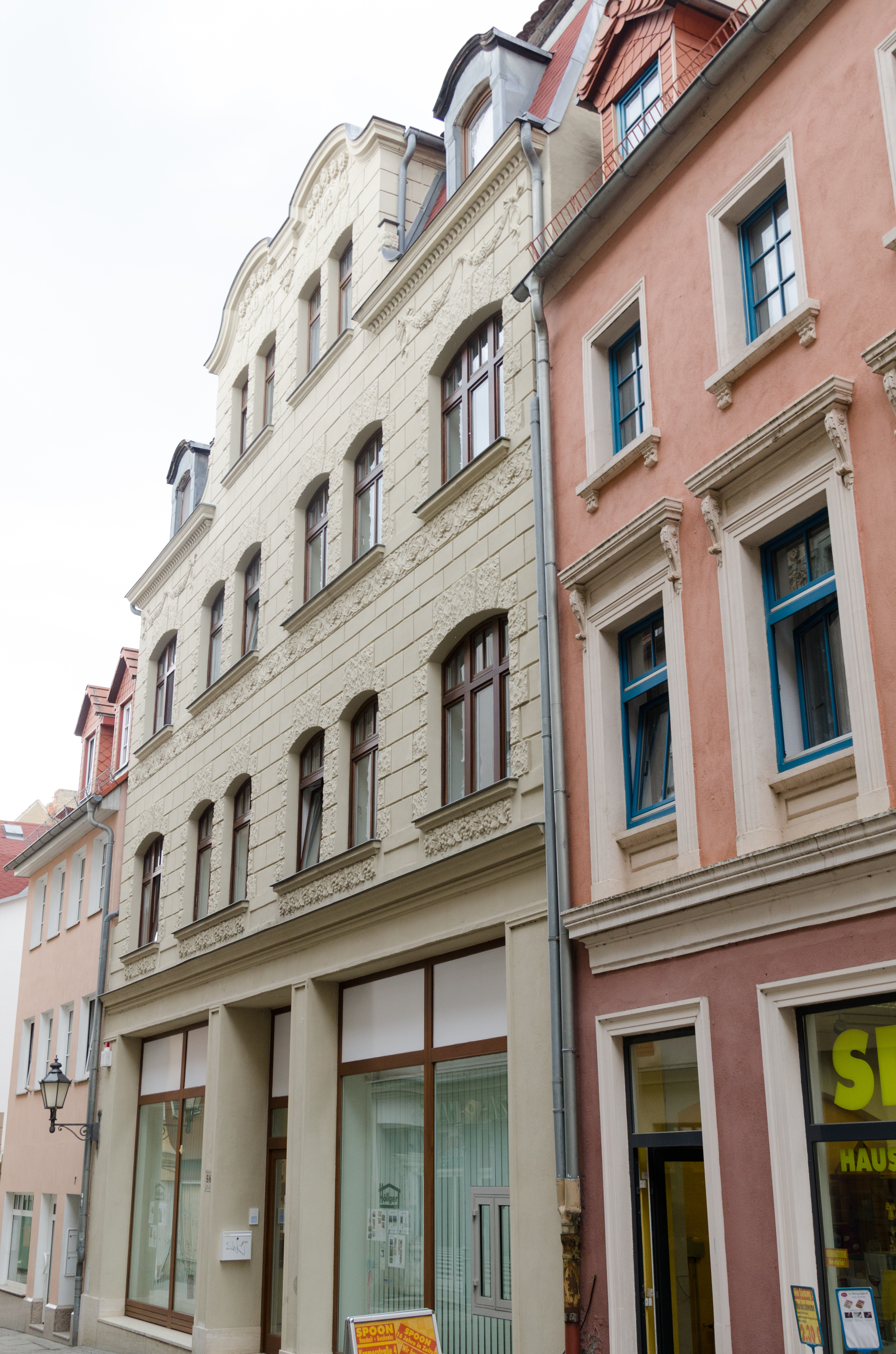 Zeitz, Kramerstraße 5 und 6